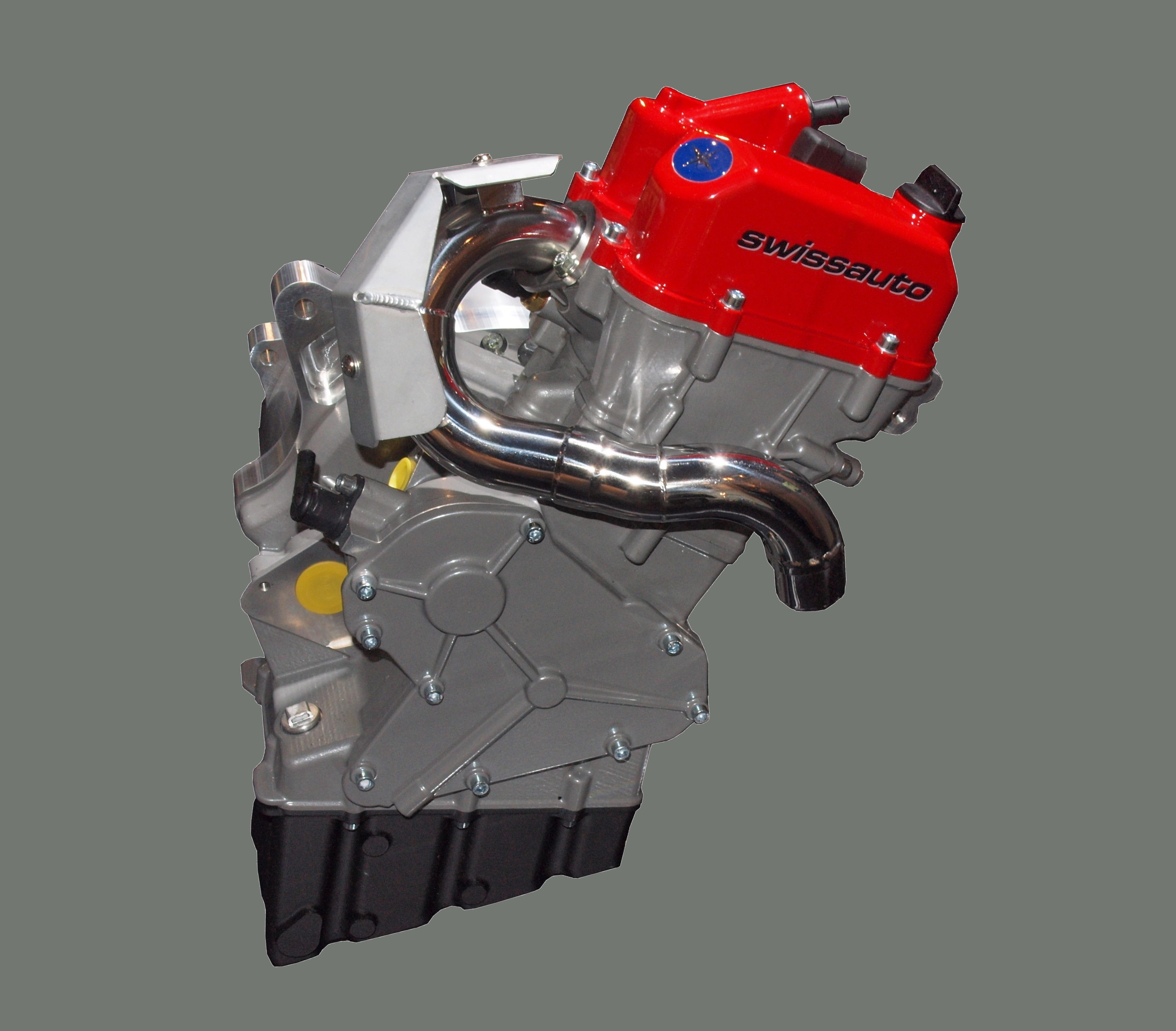 1-Zylinder-Motor mit Generator als Range-Extender für ein Hybridfahrzeug.